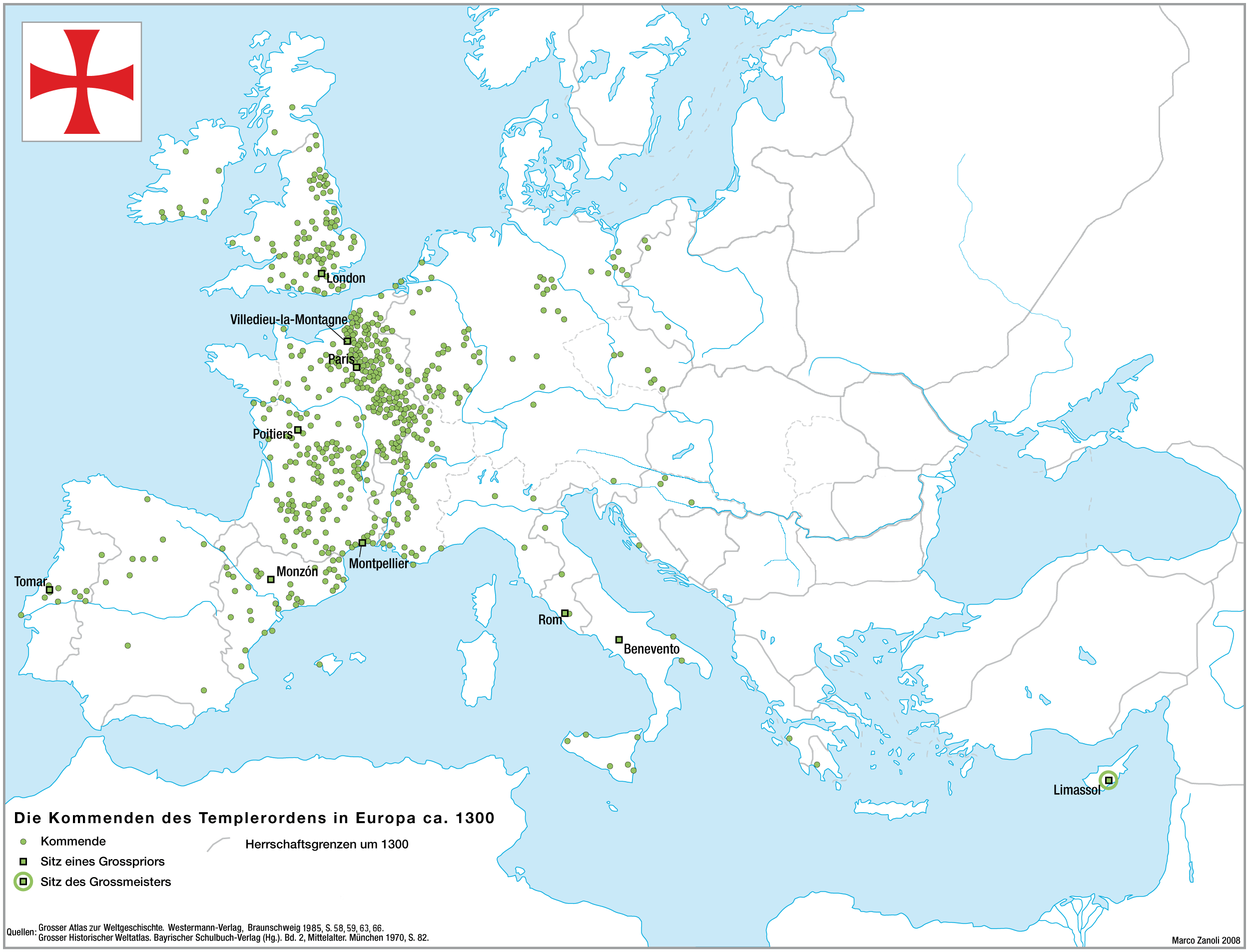 Die Niederlassungen des Templerordens in Europa um 1300. Karte aus der Saisonausstellung 2008 im Ritterhaus Bubikon, Schweiz ("Die Kreuzzüge eine Spurensuche: Die Ritterorden in der Schweiz").